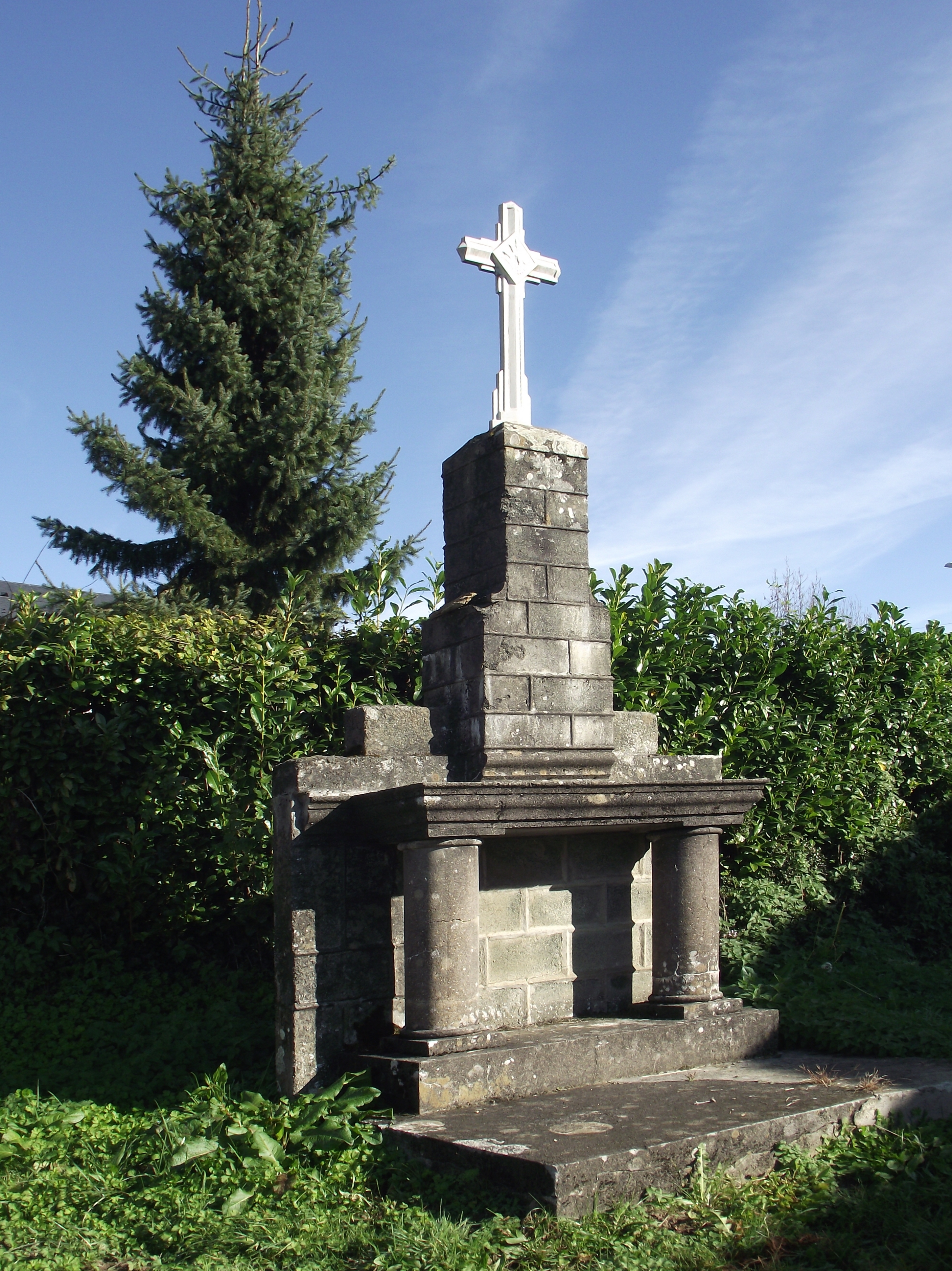 Croix de Lahitte (Arrayou-Lahitte, Hautes-Pyrénées, France)